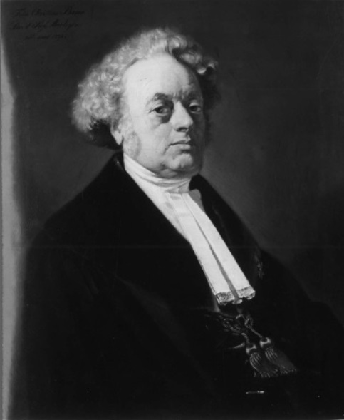 Porträt in der Tübinger Professorengalerie (Öl auf Leinwand)